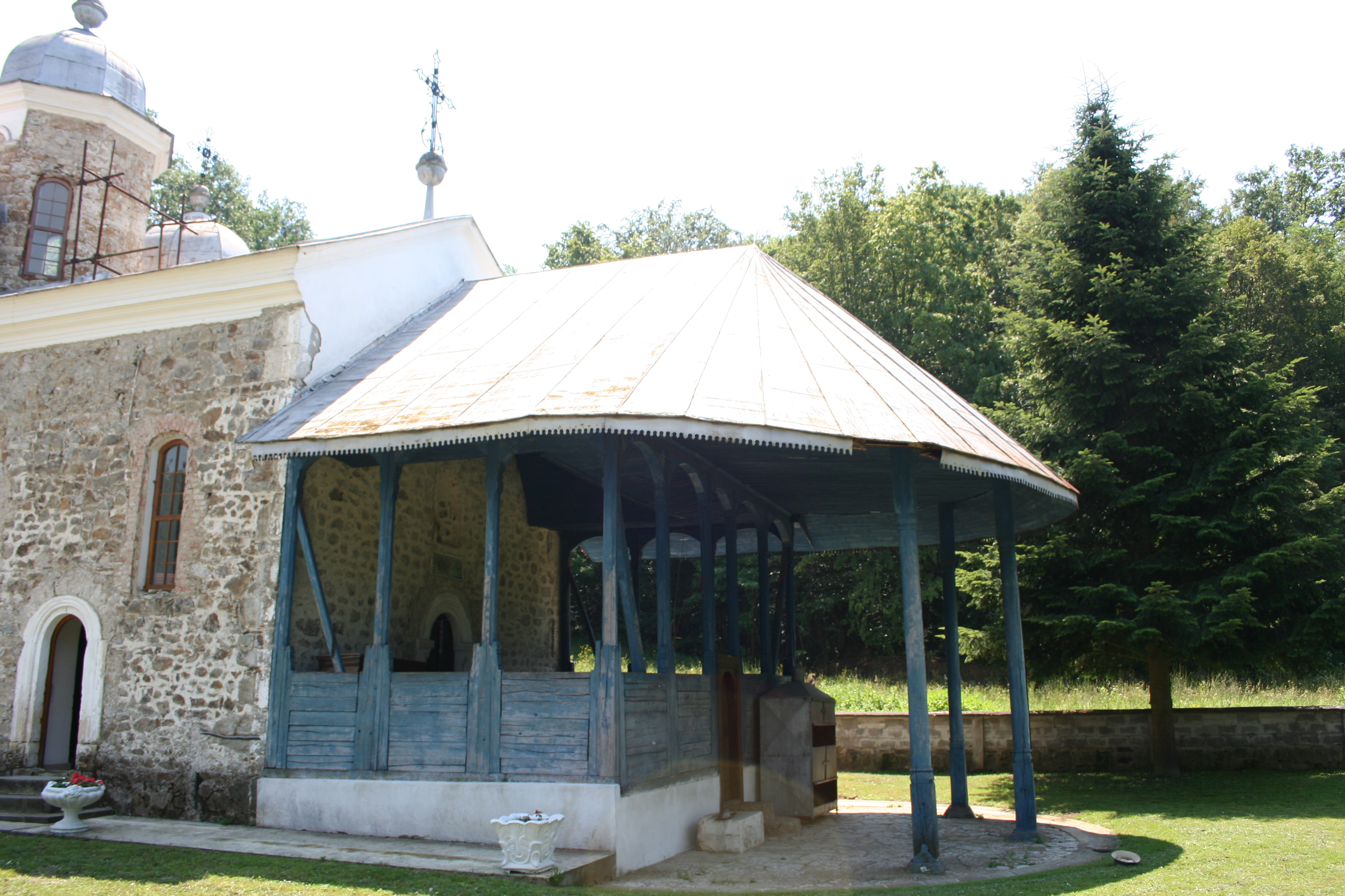 Crkva Preobraženja Gospodnjeg, Krivaja